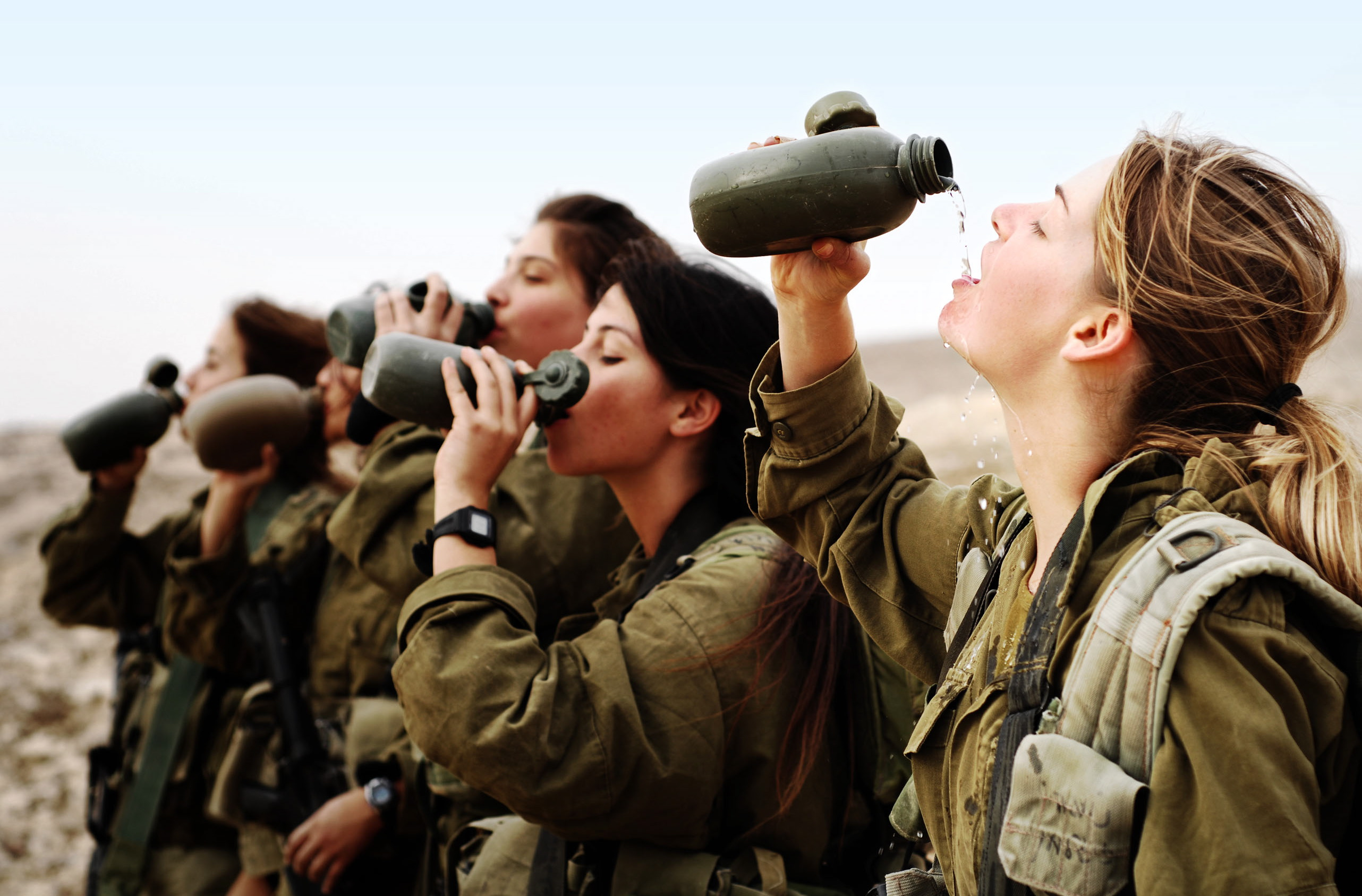 November 19, 2007. The Field Training Week in Southern Israel, part of the IDF Infantry Instructors course, includes individual and group drills, navigation practice, sleeping in the field and camouflage training. At the end of the course the female soldiers will be placed in different positions, instructing IDF Ground Forces. שבוע אימוני שדה הדרום הארץ מהווה חלק מקורס מדריכות חי"ר, וכולל תרגילי יחיד וקבוצה, אימוני ניווט, שינה והסוואה בשטח ועוד. בסוף הקורס מוצבות בתפקידים שונים כמדריכות בזרוע היבשה.